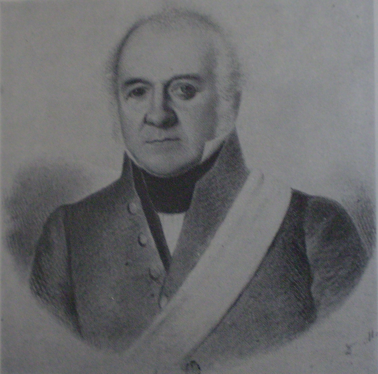 Manuel Vicente Maza. Dibujo de Ignacio Baz. Original en el Museo Histórico Nacional